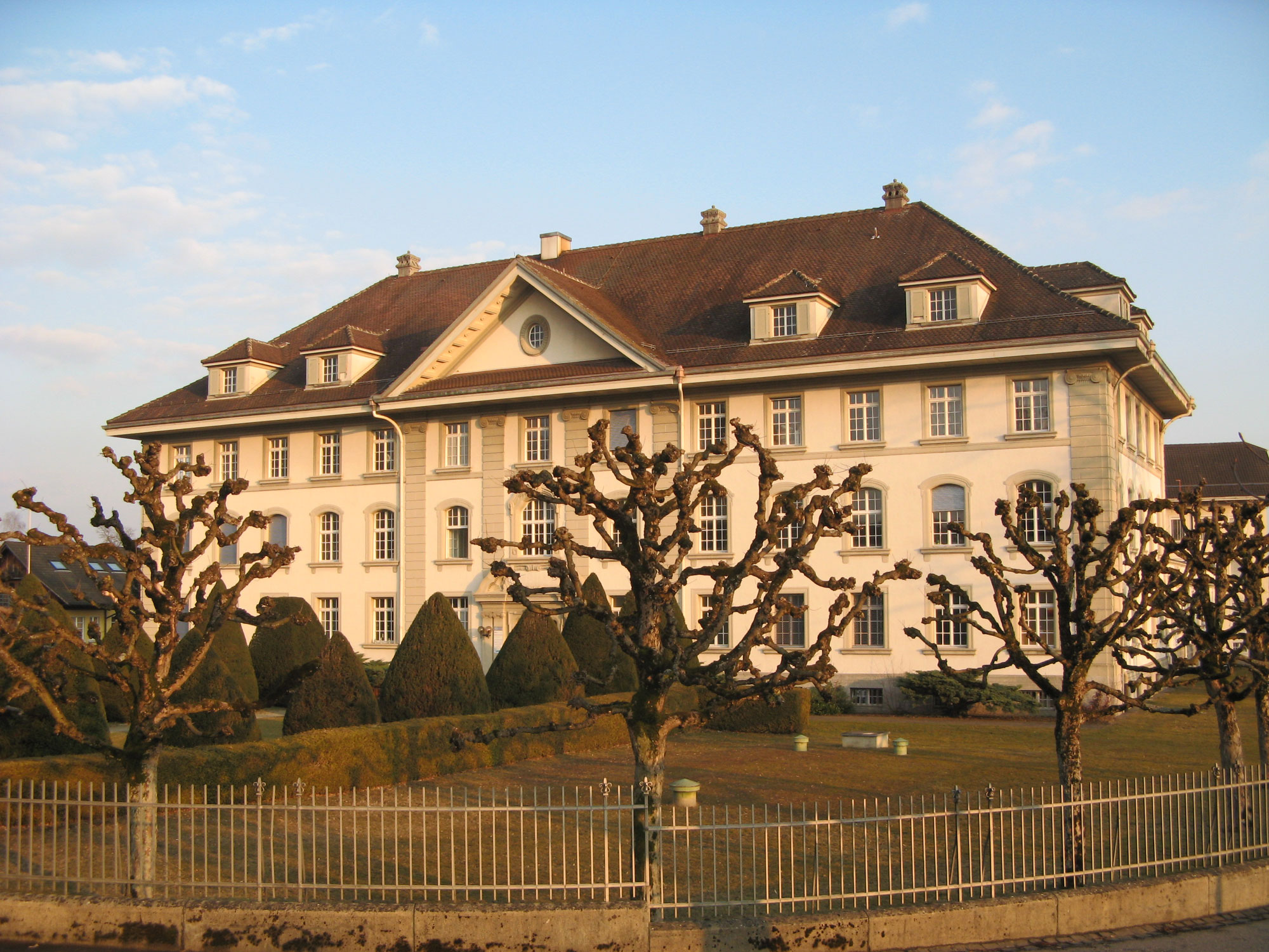 Ehemaliges Verwaltungsgebäude der Georges Meyer & Cie. in Wohlen, erbaut 1917 bis 1919.